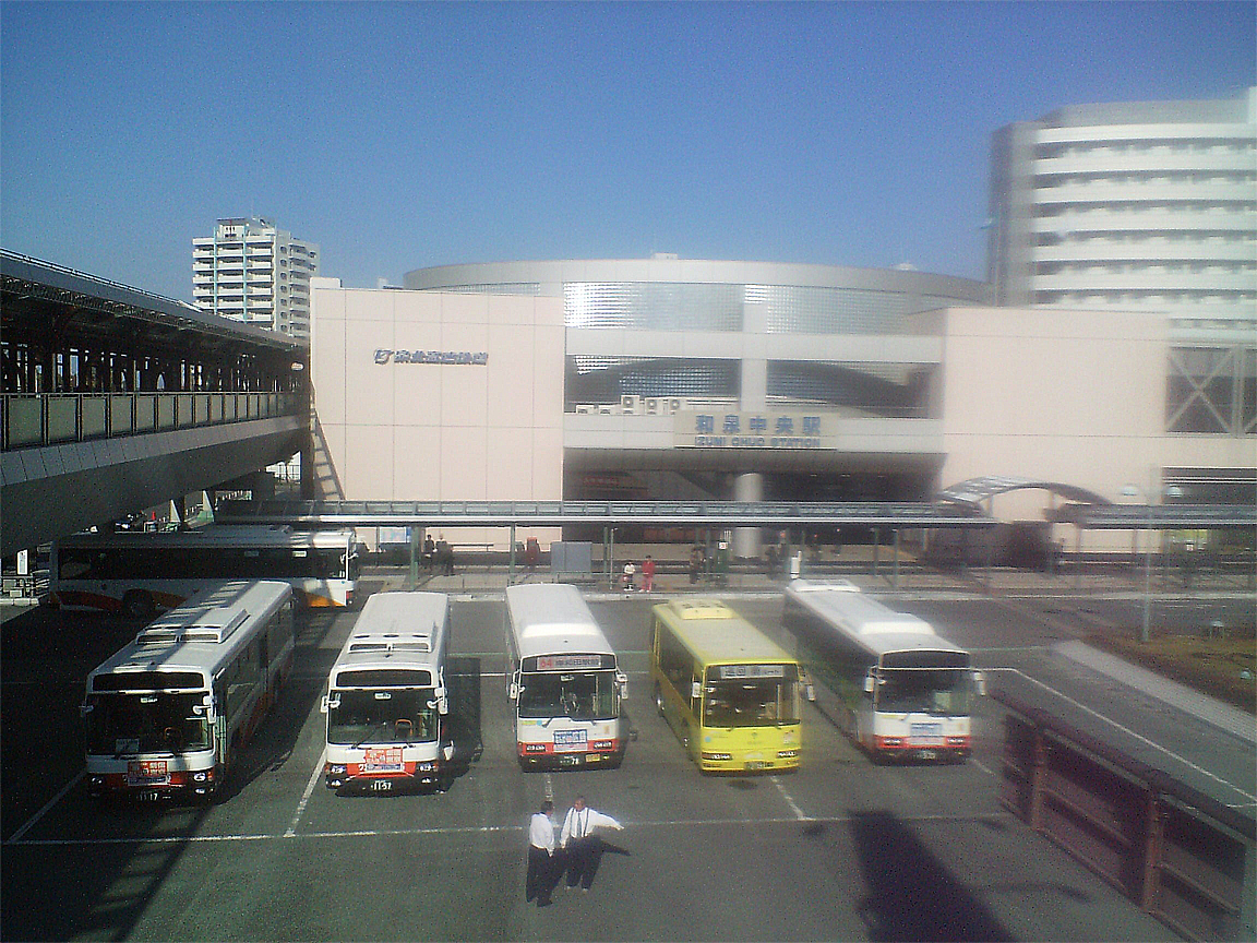 投稿者自身が大阪府内の鉄道駅のひとつである泉北高速鉄道「和泉中央」駅 （大阪府和泉市いぶき野5-1-1）を撮影。